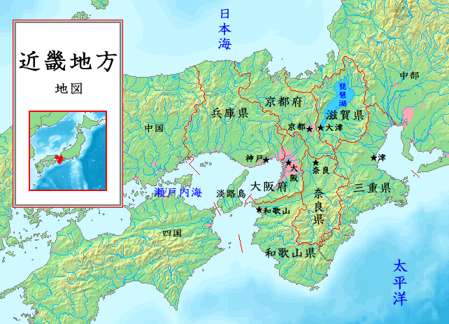 近畿地方の地図である。